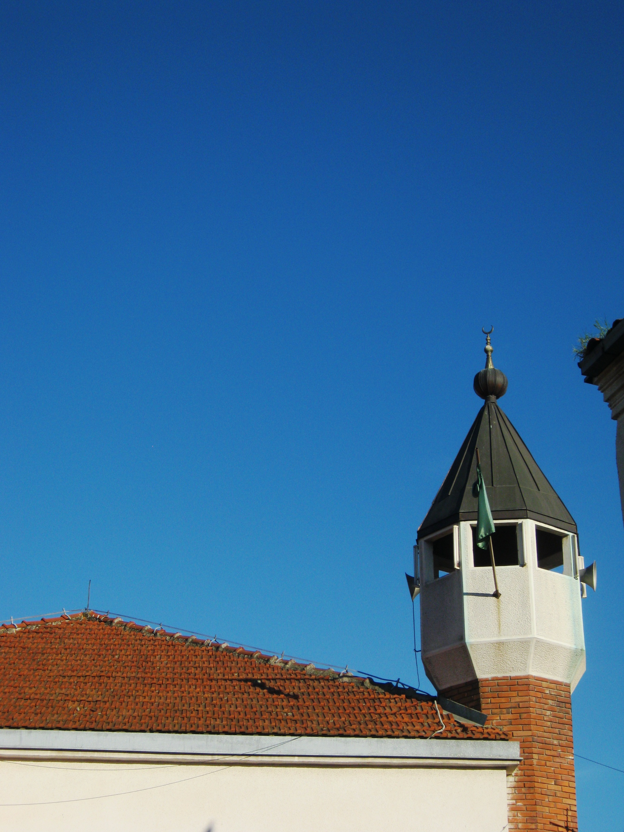 Џамија Ќосе Кади